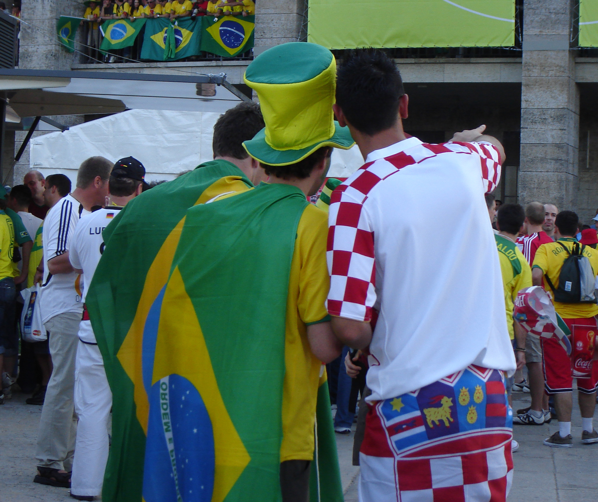 Fußballweltmeisterschaft 2006 Berliner Olympiastadion, Fans vor dem Gruppenspel Brasilien gegen Kroatien (13.06.2006)